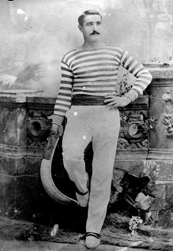 Txikito de Eibar in 1880